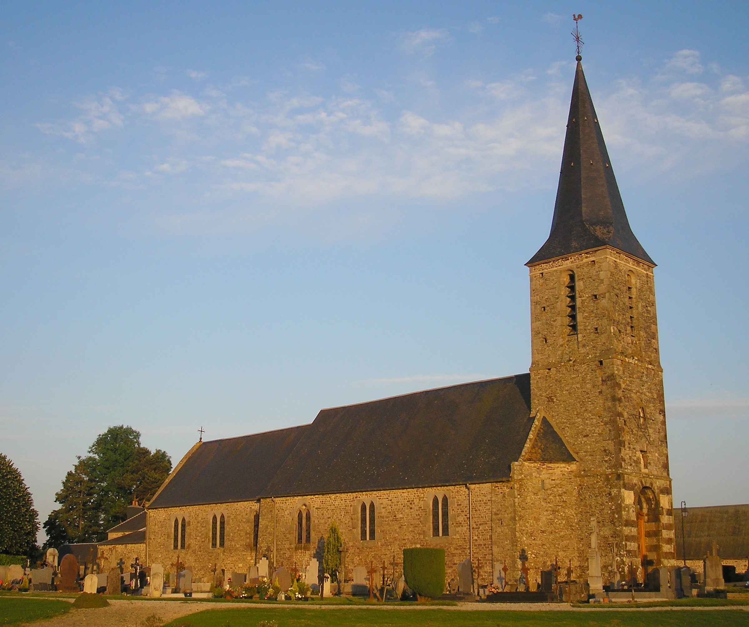 Carville (Normandie, France). L'église Notre-Dame-et-Sainte-Anne.